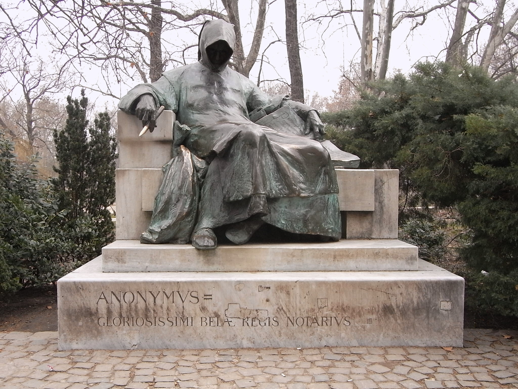 Statue des Chronisten Anonymus, Schloss Vajdahunyad (Budapest).